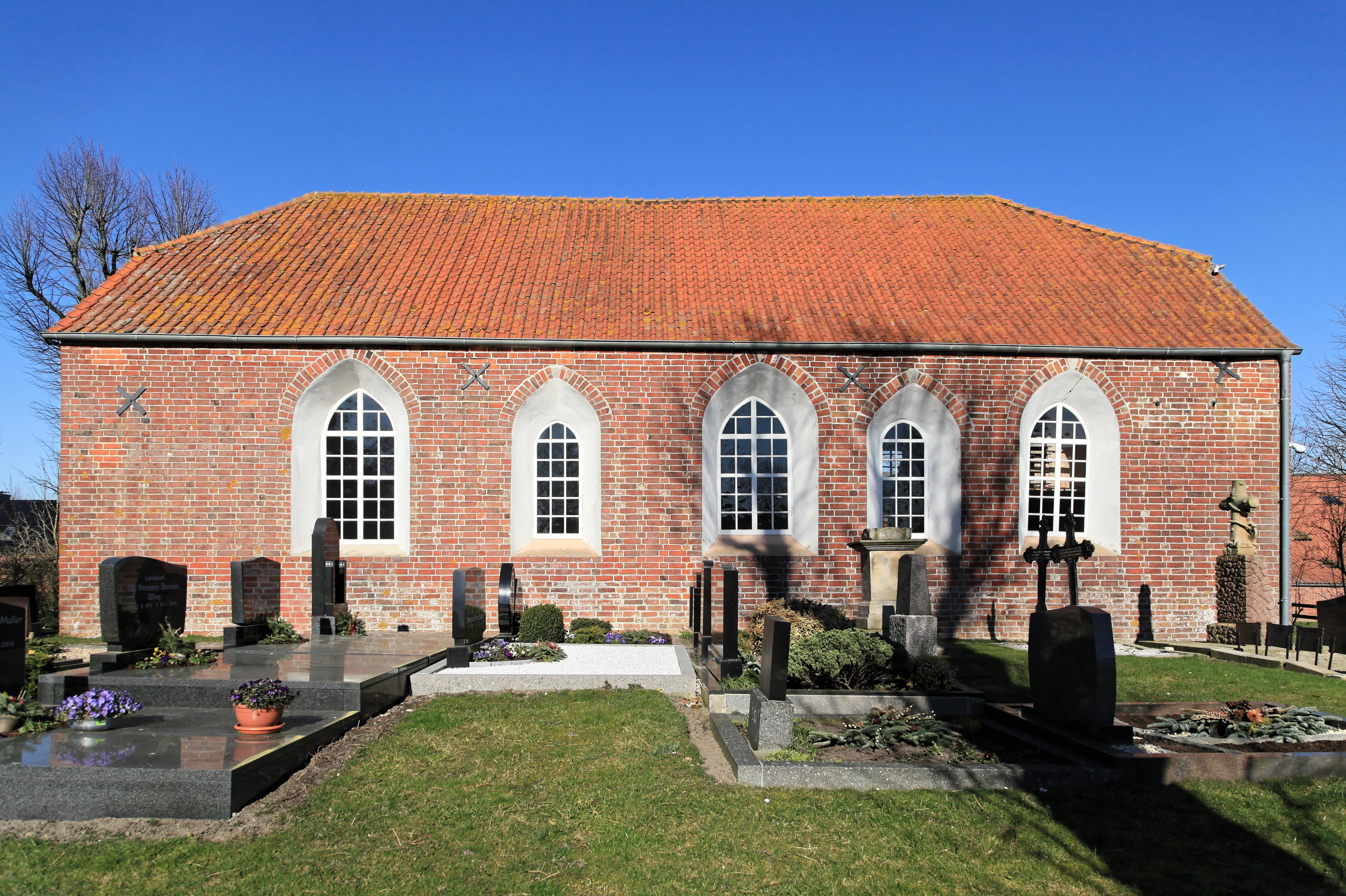 Friedhof und Kirche, Turmweg in Oldendorp, Jemgum